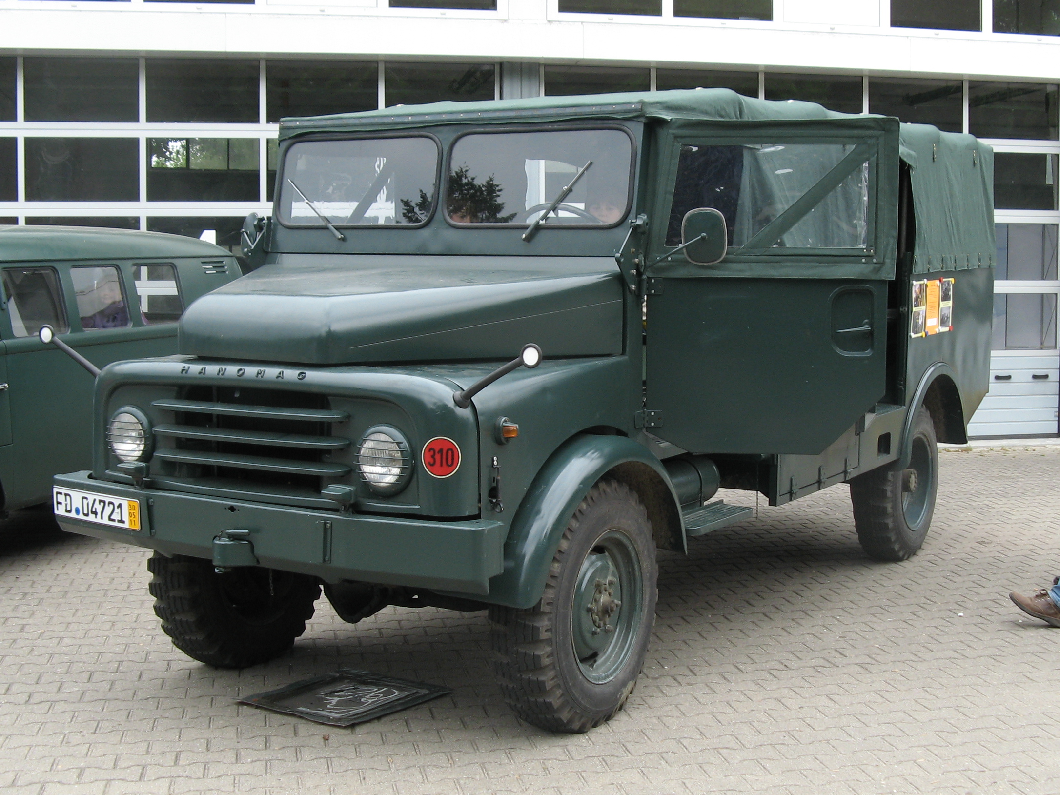 Gruppenwagen Hanomag AL 28 (GruKw II) des Bundesgrenzschutz. Ausgestellt am Tag der offenen Tür der Bundespolizei (ehemalig Bundesgrenzschutz) anlässlich des 60 Jährigen Jubiläum.